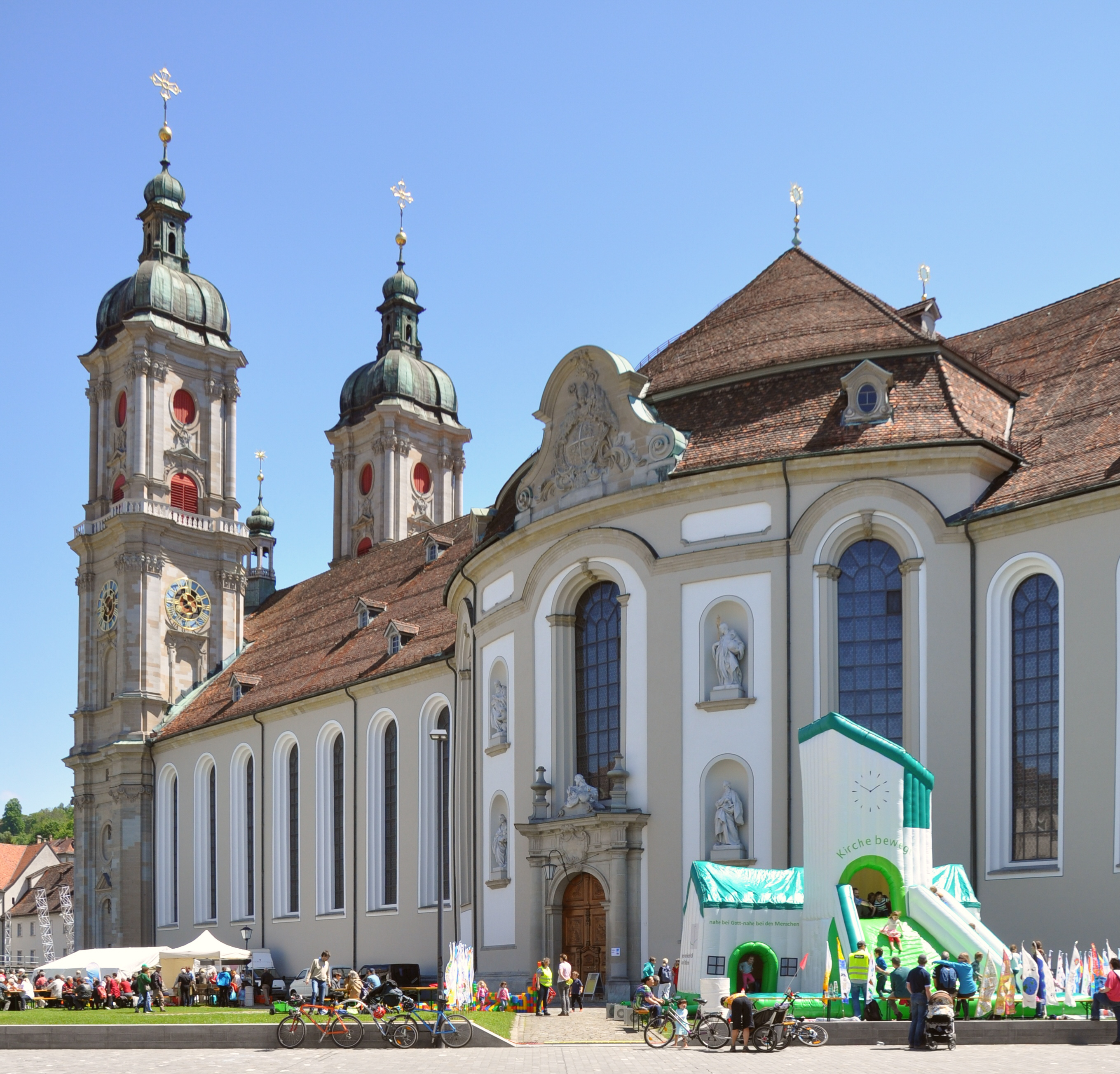 St. Gallen SG, Stiftskirche (im Vordergrund Hüpfburg aus Anlass des Bodensee-Kirchentags 2014)